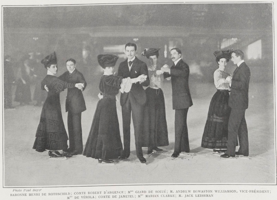 "Patins et traineaux" (Le Figaro-Modes, 15 janvier 1905) : baronne Henri de Rothschild, comte Robert d'Argence, Mme Giard de Souzé, M. Andrew Rowaston Williamson (vice-président), Mlle de Vérola, comte de Jametel, Mlle Marian Clarke, M. Jack Leishman